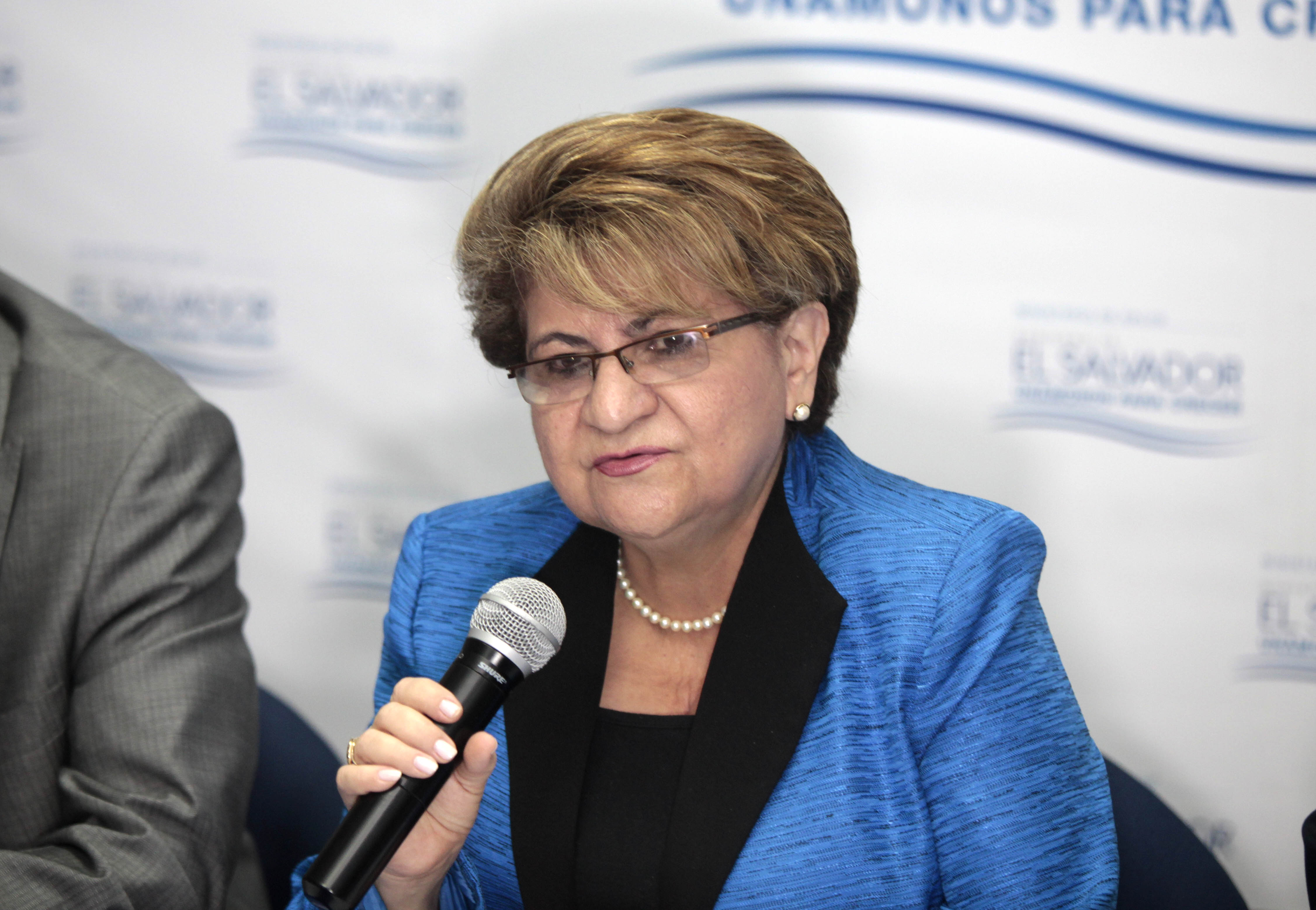 Violeta Menjivar, Ministra de Salud.